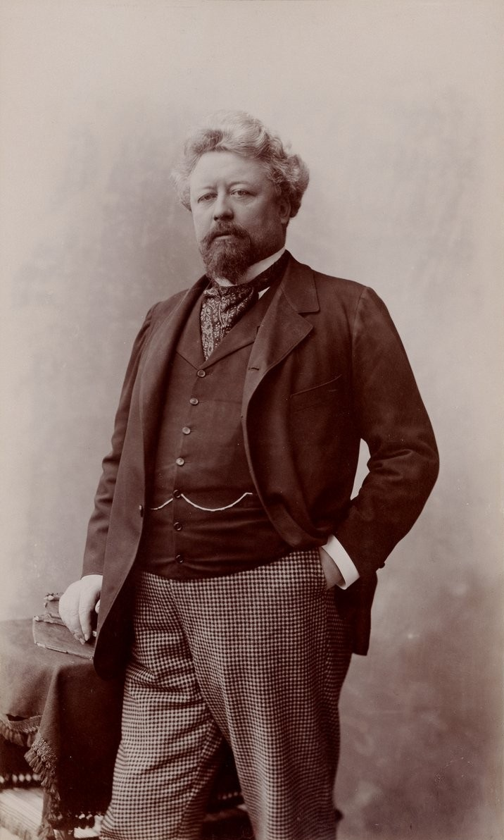 "M. Bauër. Critique".